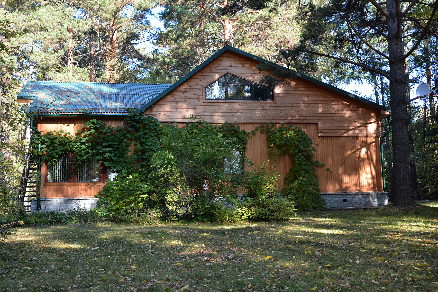 Дом, где жил академик М.А. Лаврентьев: улица Золотодолинская, 75, Новосибирск, Новосибирская область